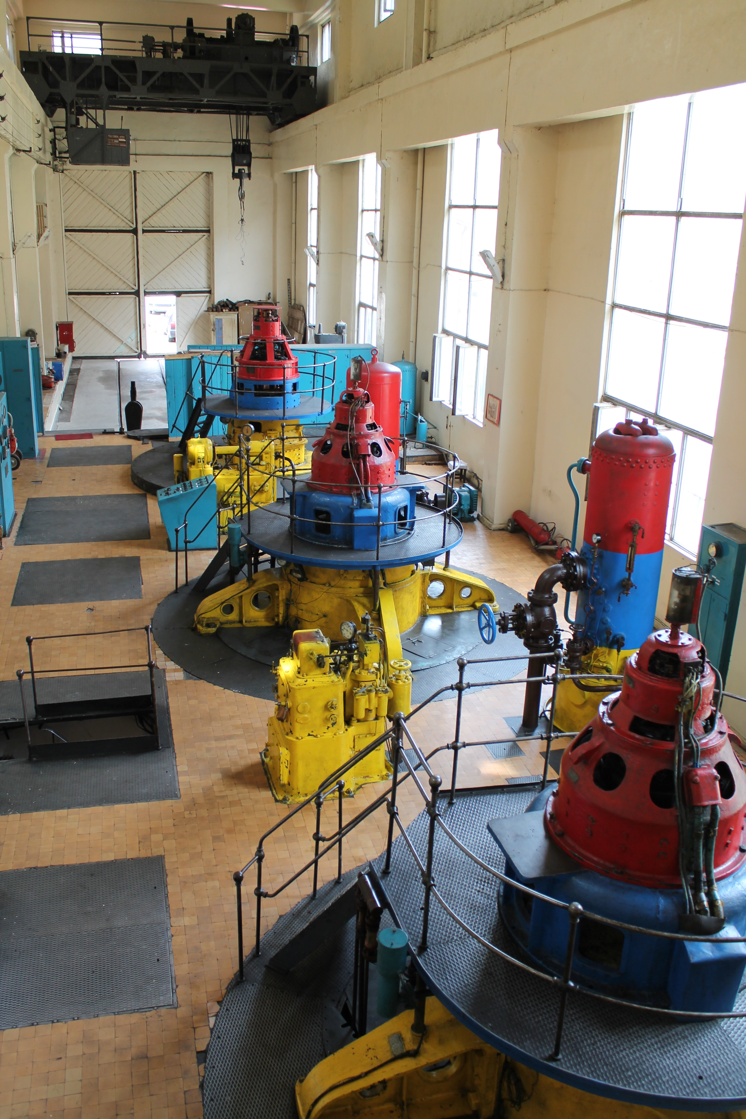 Машинный зал Дзорагетской ГЭС